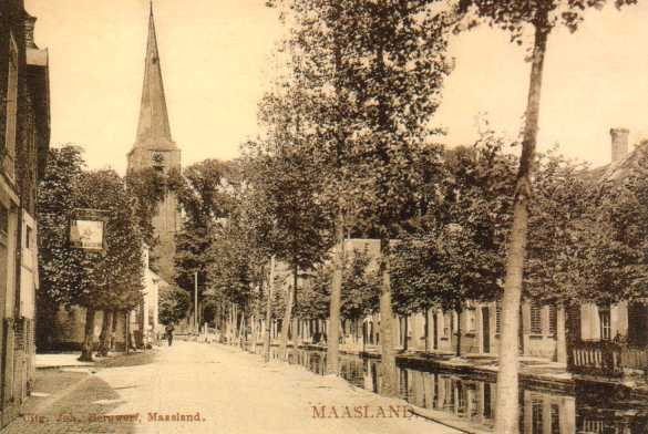 Maasland, Herenstraat omstreeks 1905